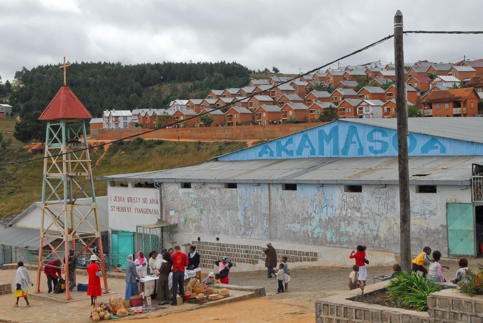 Akamasoa, obra del Padre Pedro en Madagascar